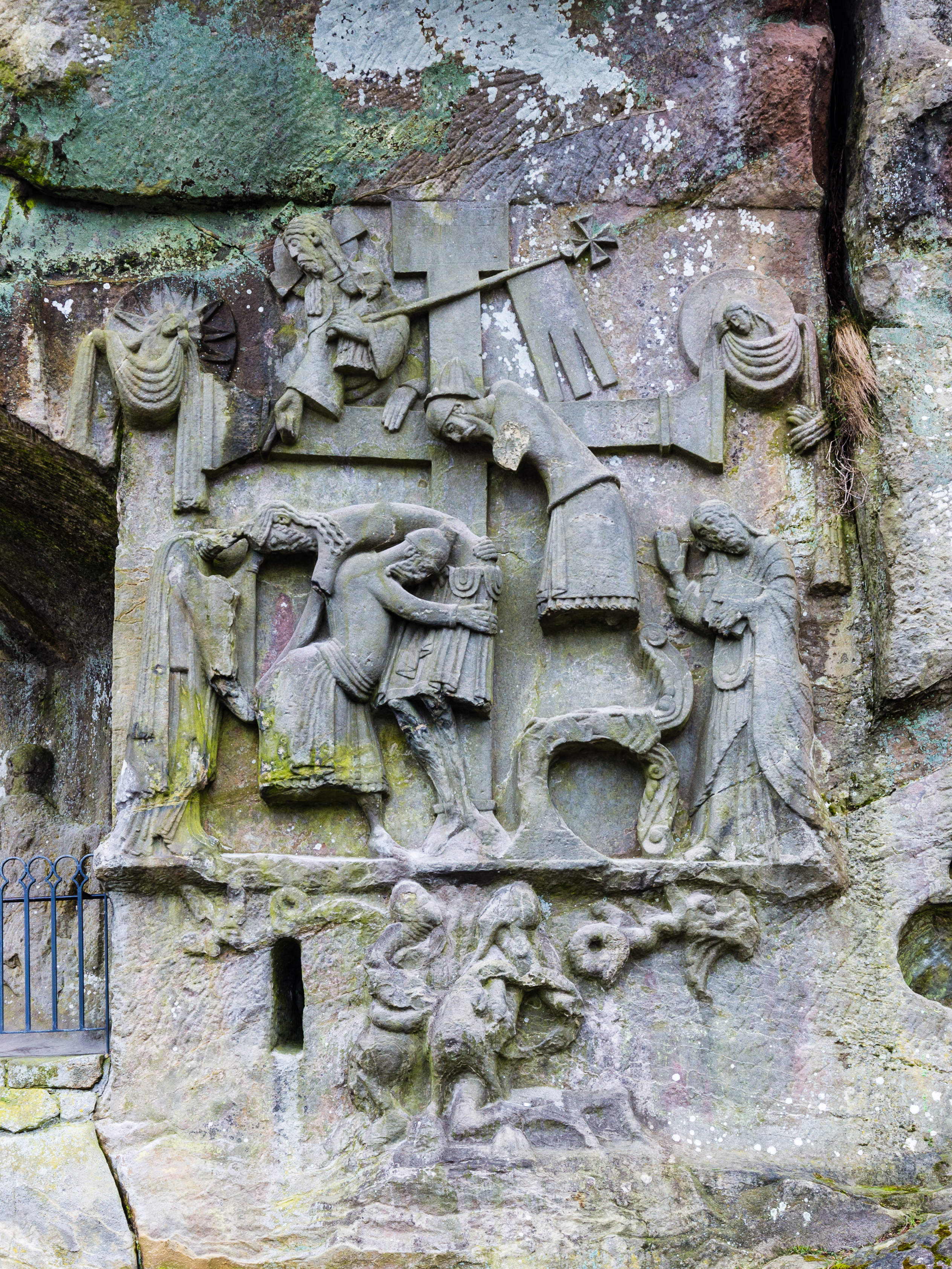 Kreuzabnahmerelief an den Externsteinen.